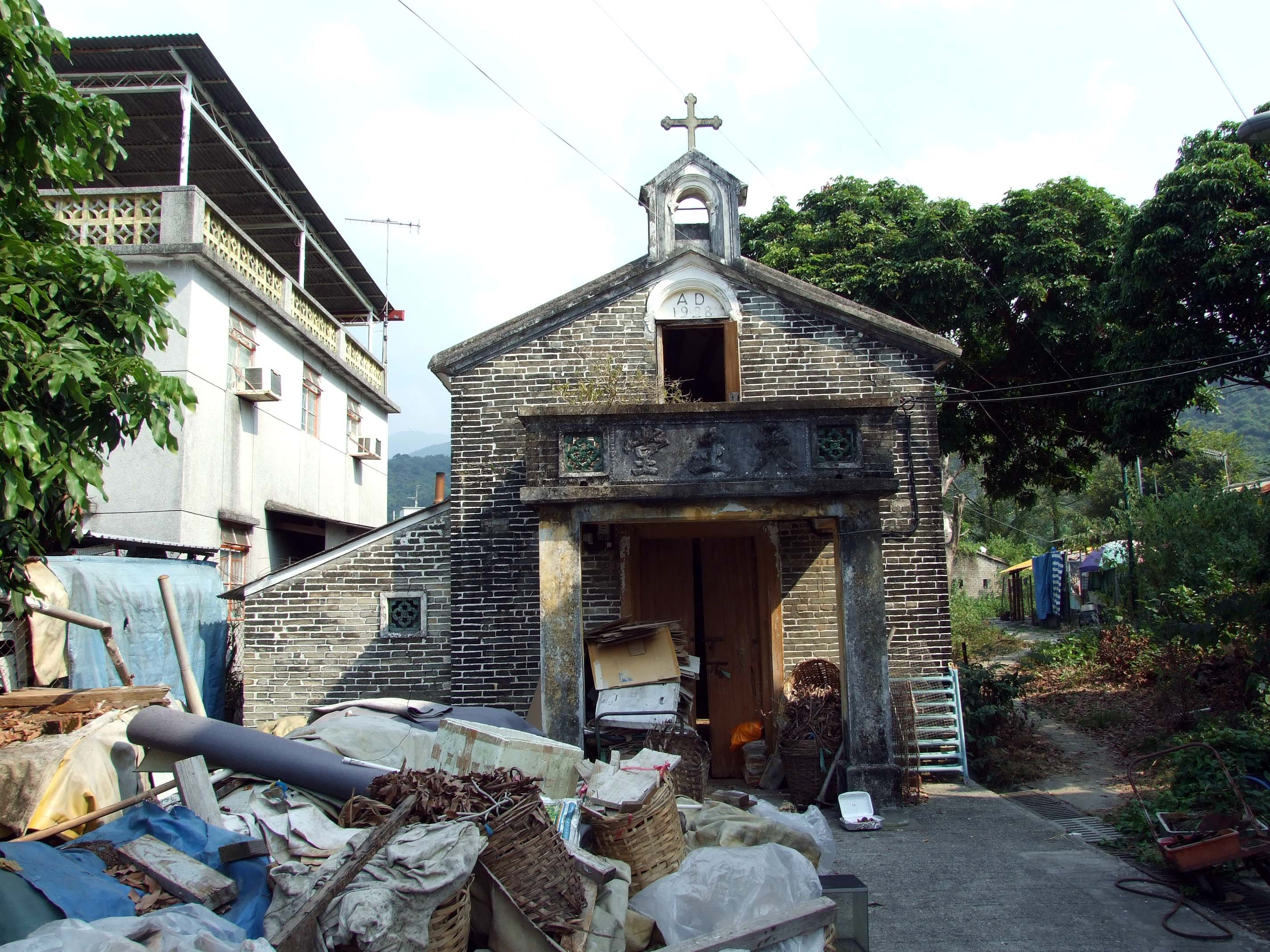 中文（香港）: 元朗八鄉長莆聖若望小堂